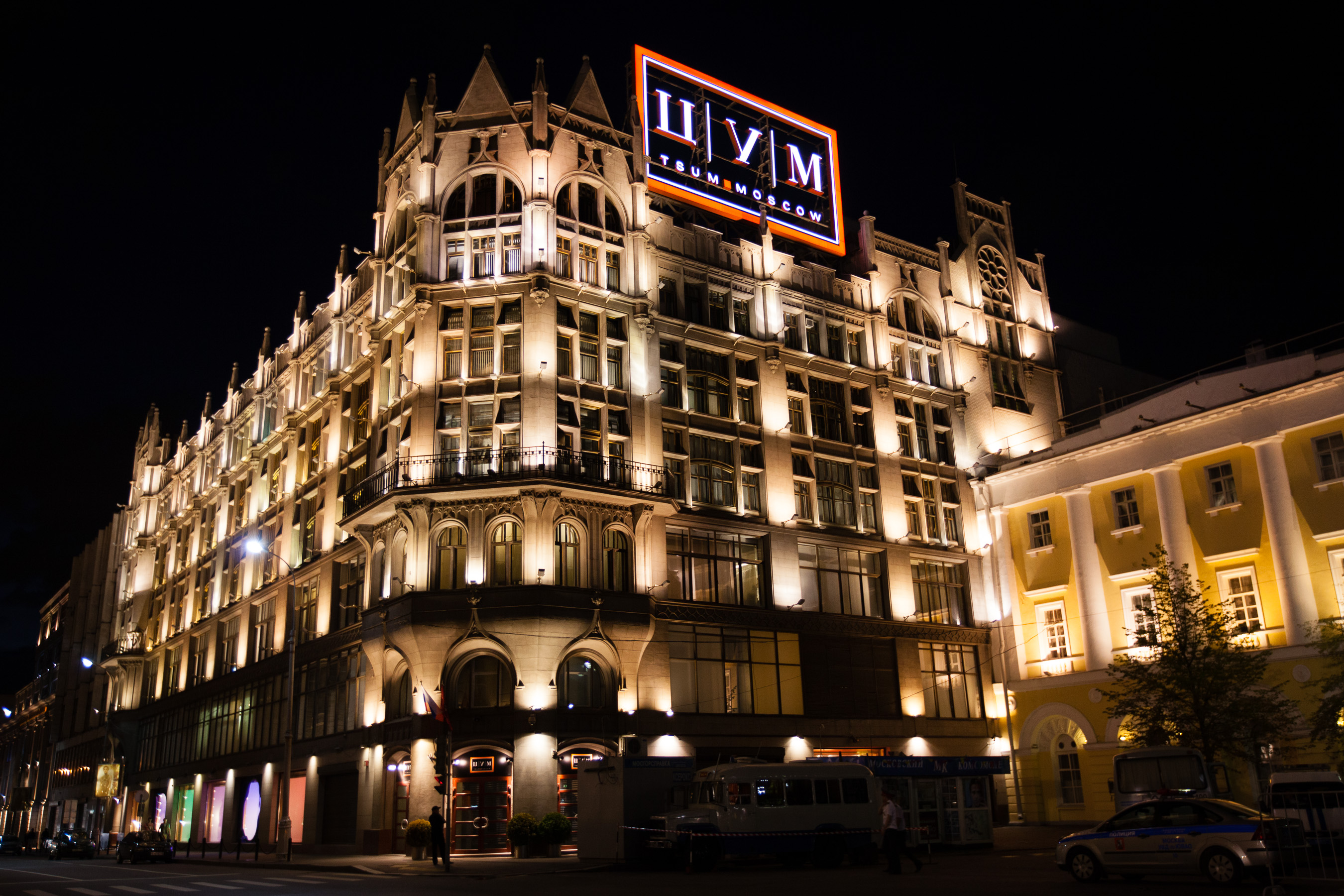 Moscow